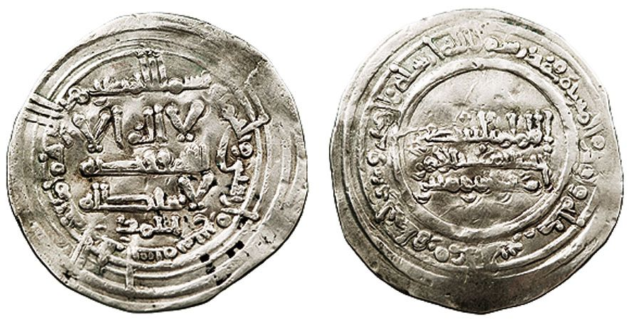 Dírham de Abd-ar-Rahman III. En plata. Encunyada l'any 347 de l'Hègira a Madīnat al-Zahrā.